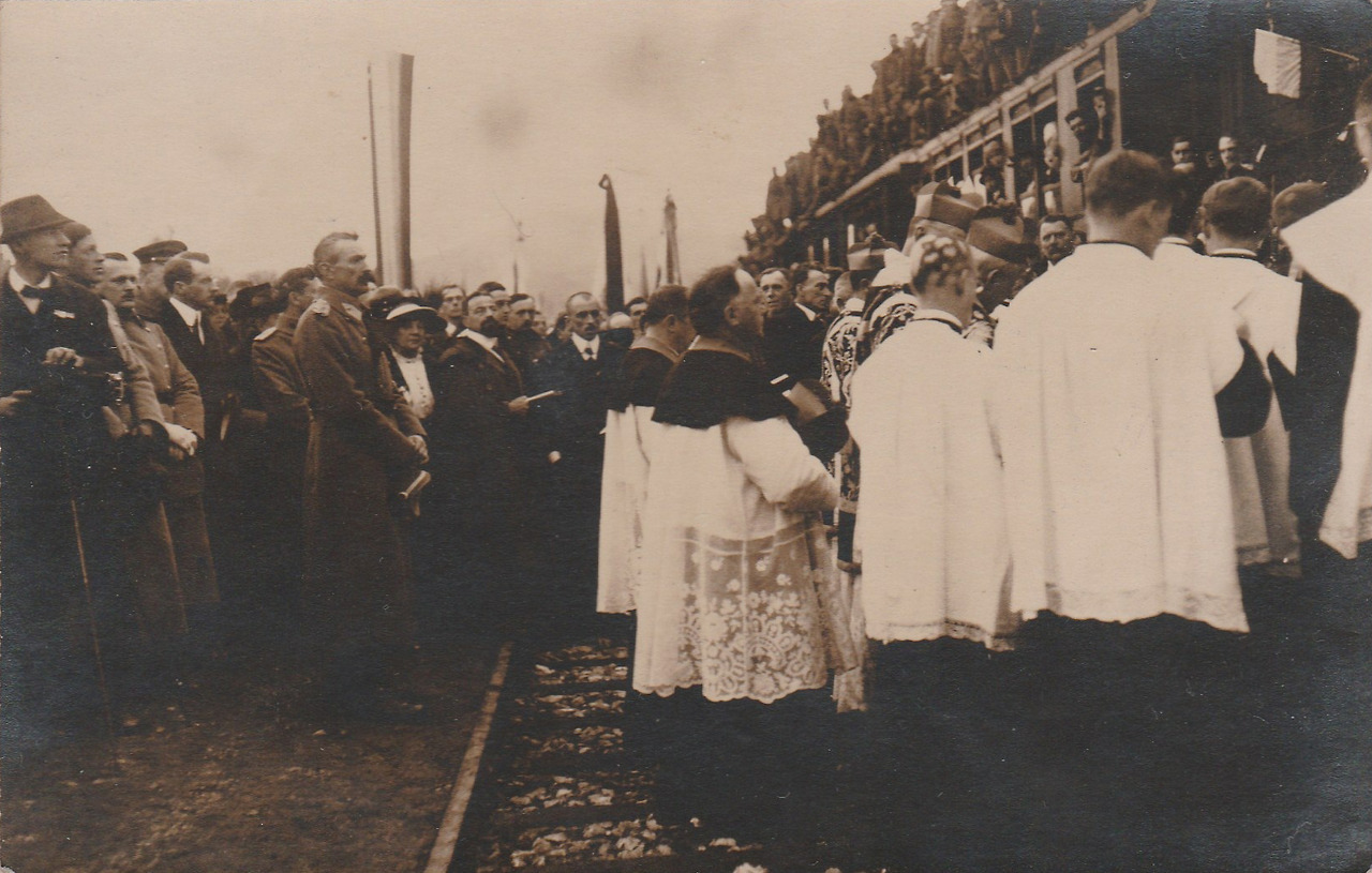 General Rudolf Maister je imel 27. aprila 1919 govor na mariborski železniški postaji, ob vrnitvi posmrtnih ostankov hrvaških upornih plemičev, bana Nikole Zrinjskega in njegovega svaka Franca Krištofa Frankopana.